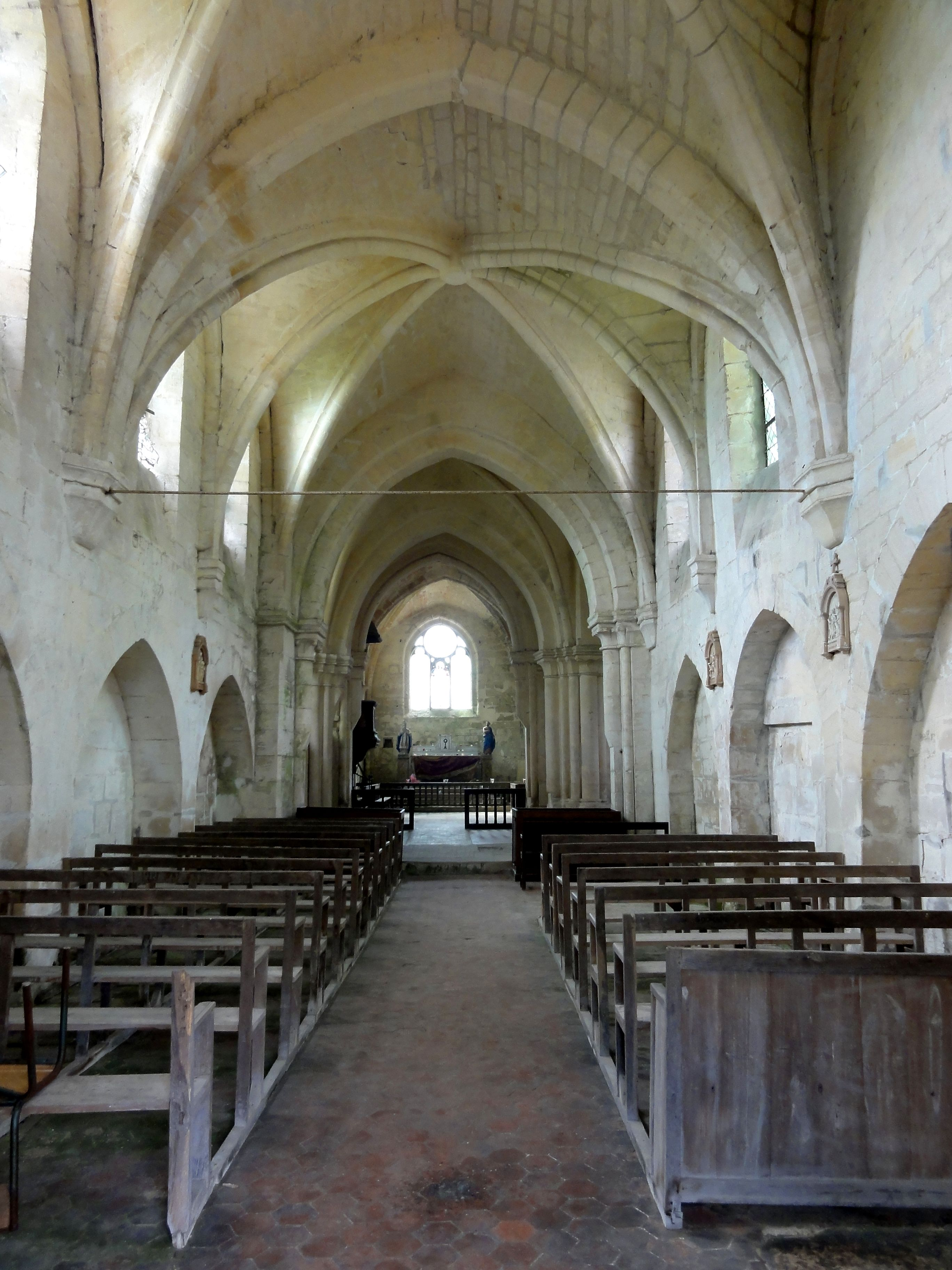 Intérieur de la nef.